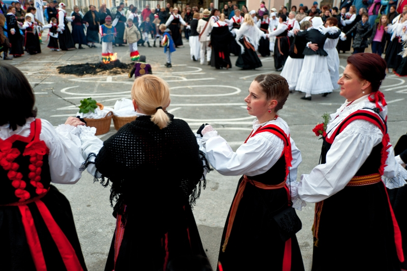 Mesopusni utorak u Selcu kod Crikvenice. Mlaća prazne slame i selačko kolo.